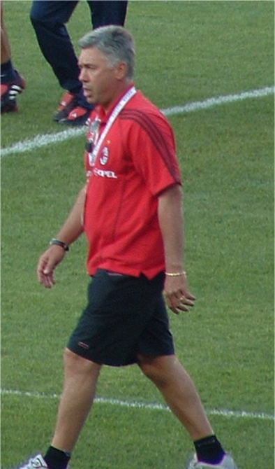 Carlo Ancelotti